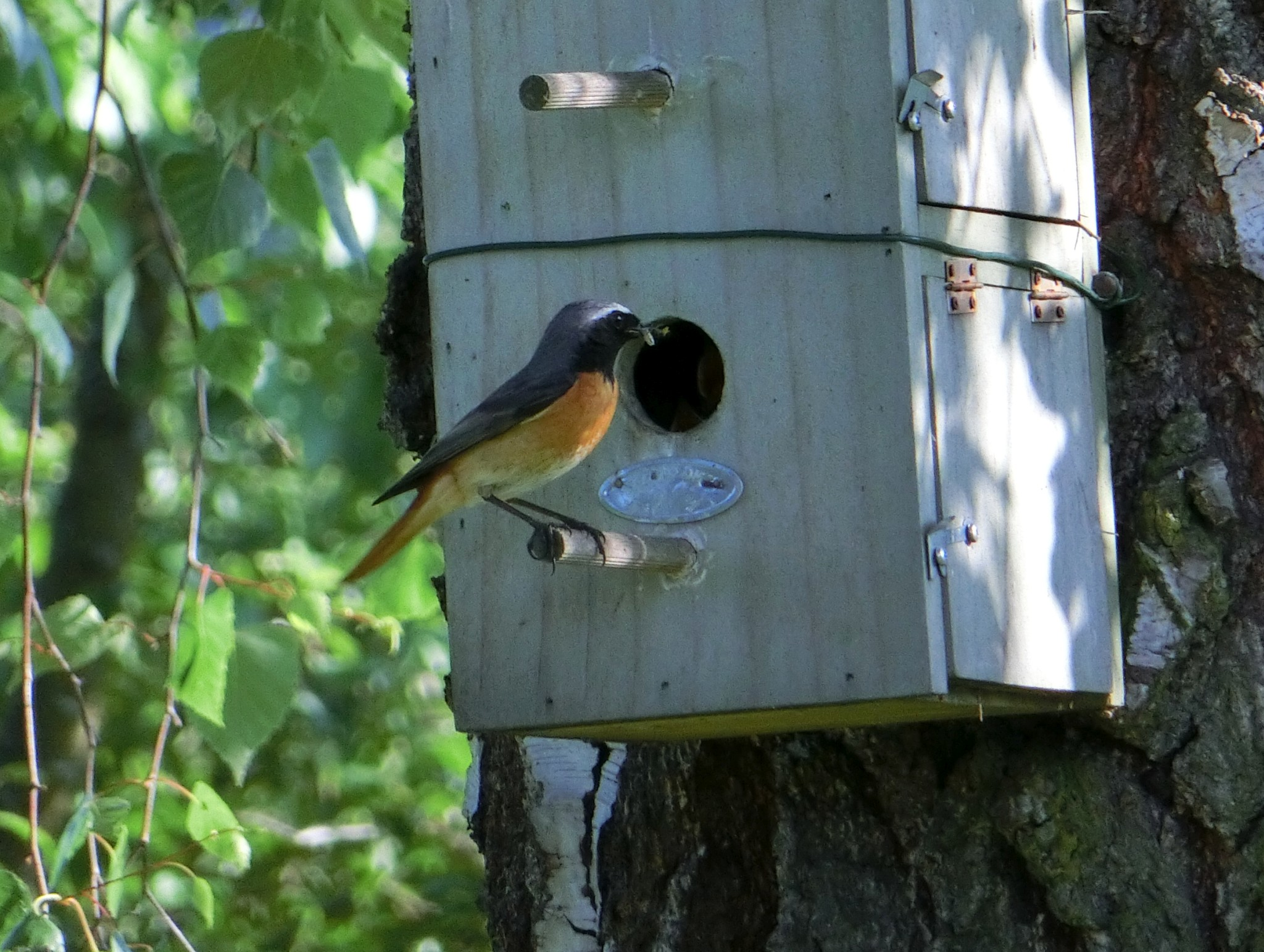 Gartenrotschwanz (Phoenicurus phoenicurus, Männchen) beim Aufziehen der Jungen in unserem Garten in Fellbach